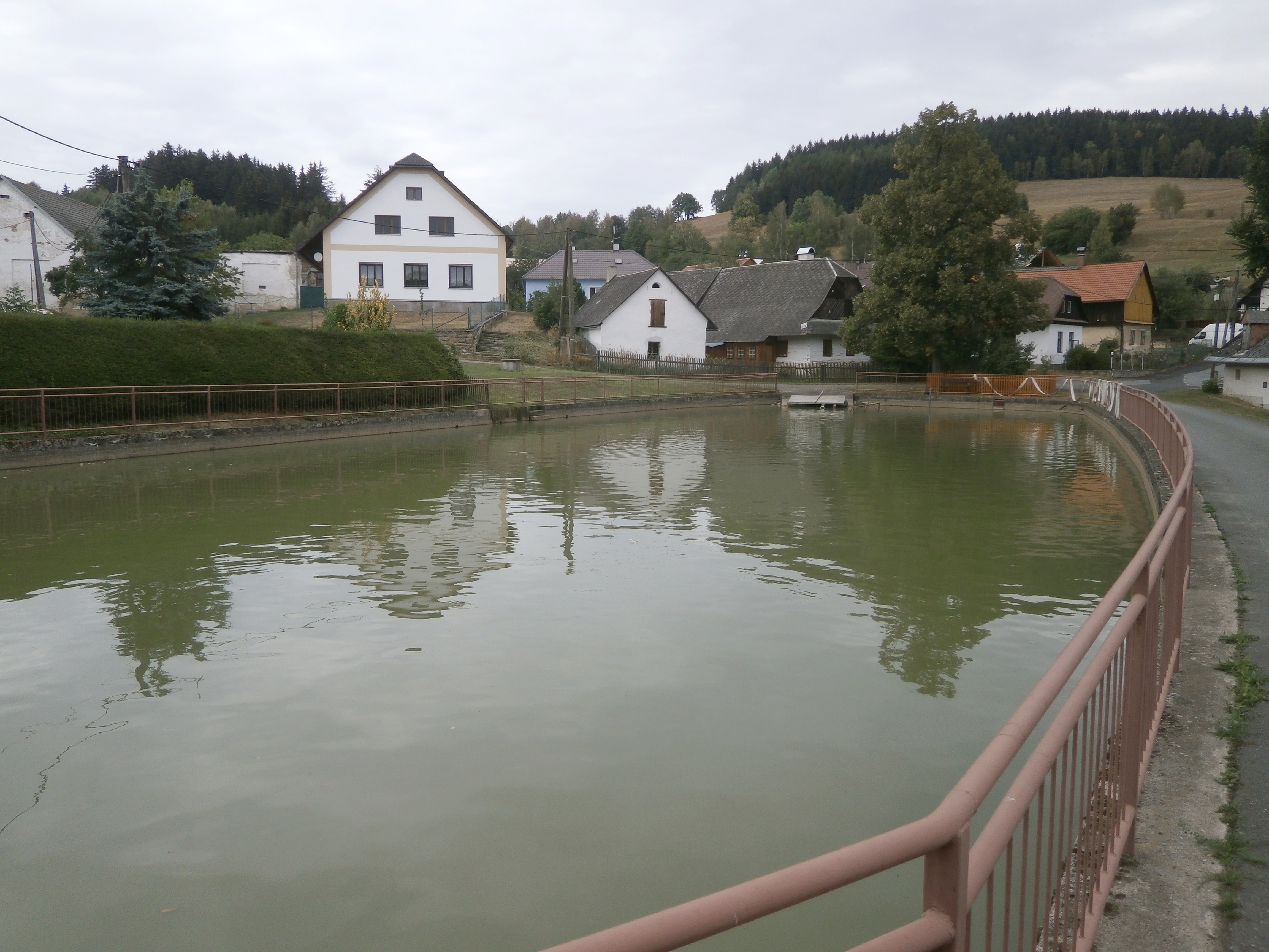 Javorek - náves, č.p. 16 a 37